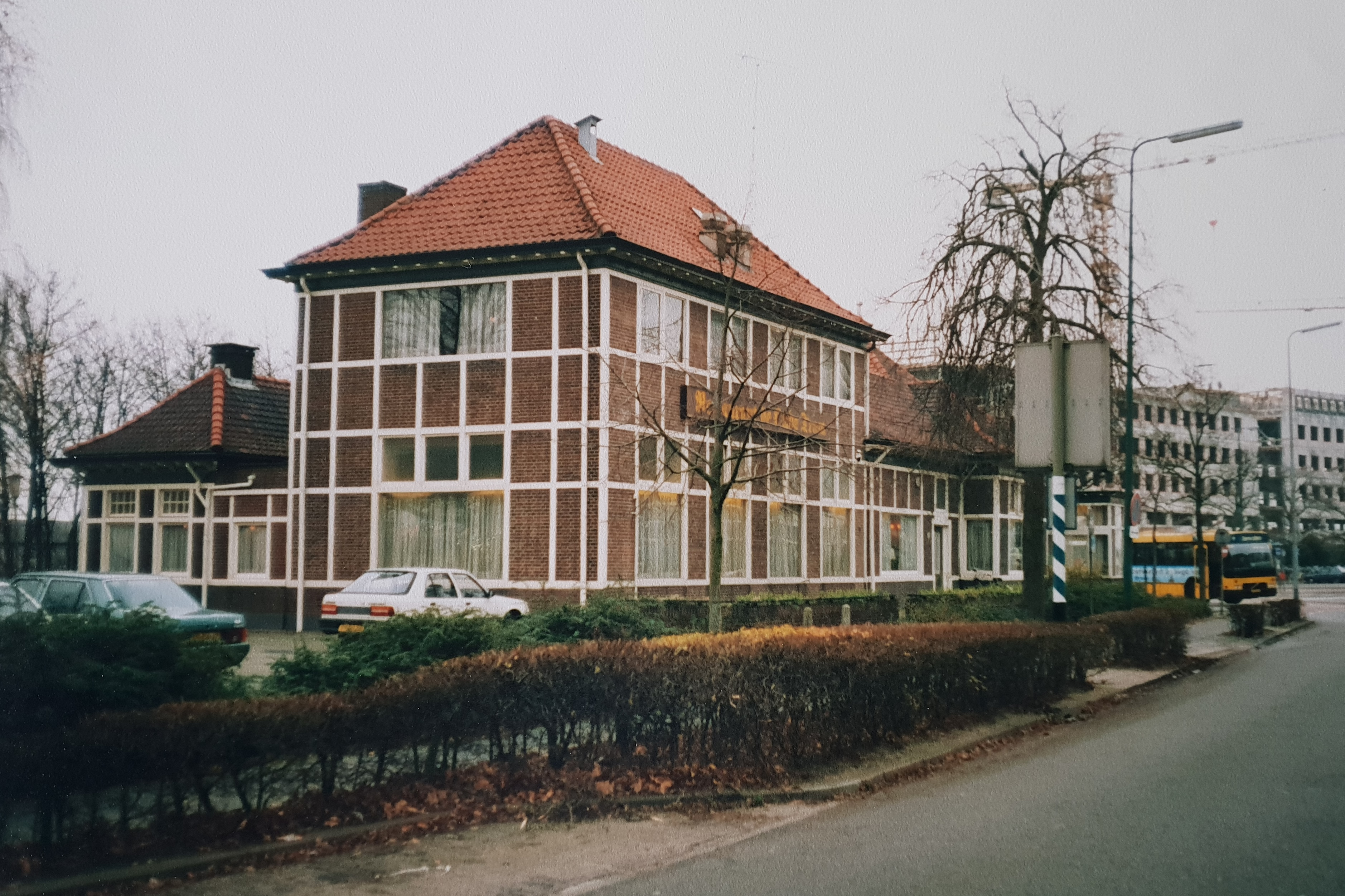 Voormalig tramstation Amersfoort (foto: Daniel van der Ree)